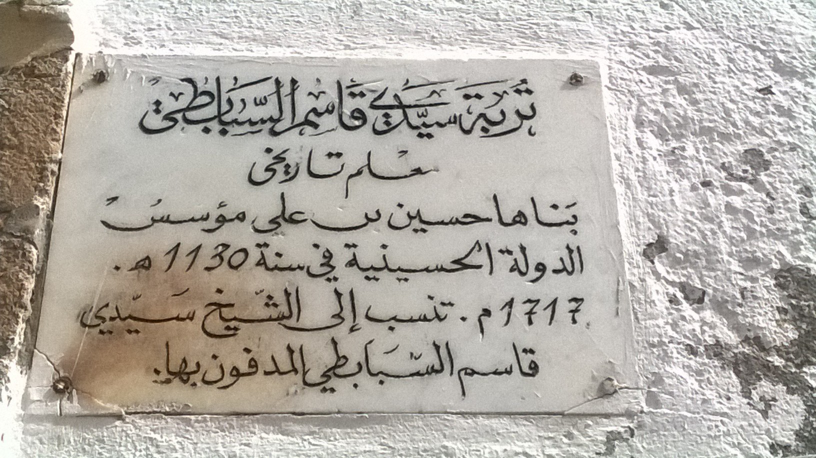 La médina de Tunis مدينة تونس العتيقة